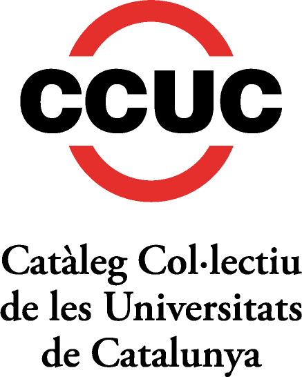 Logotip CCUC